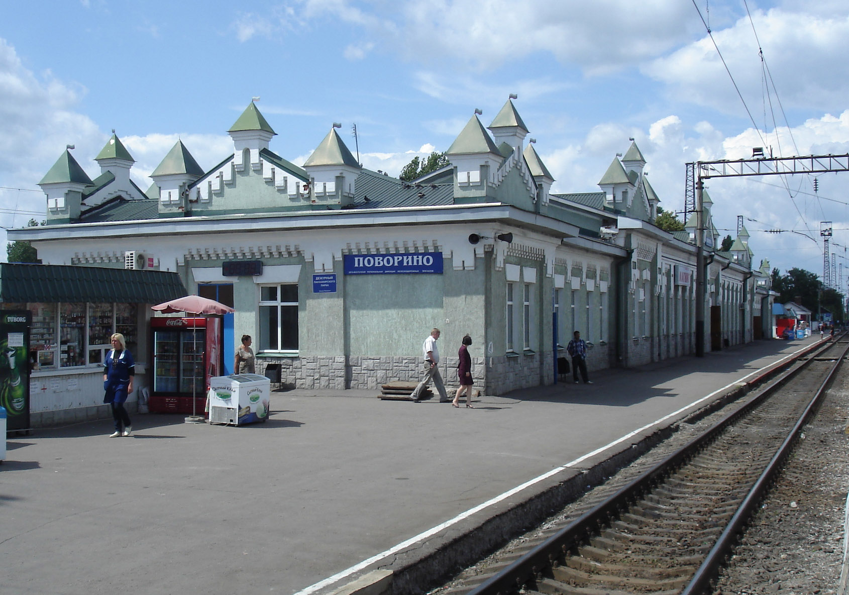 ЖД-станция Поворино